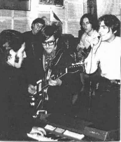 Los Gatos tocando en La Cueva de Pueyrredón